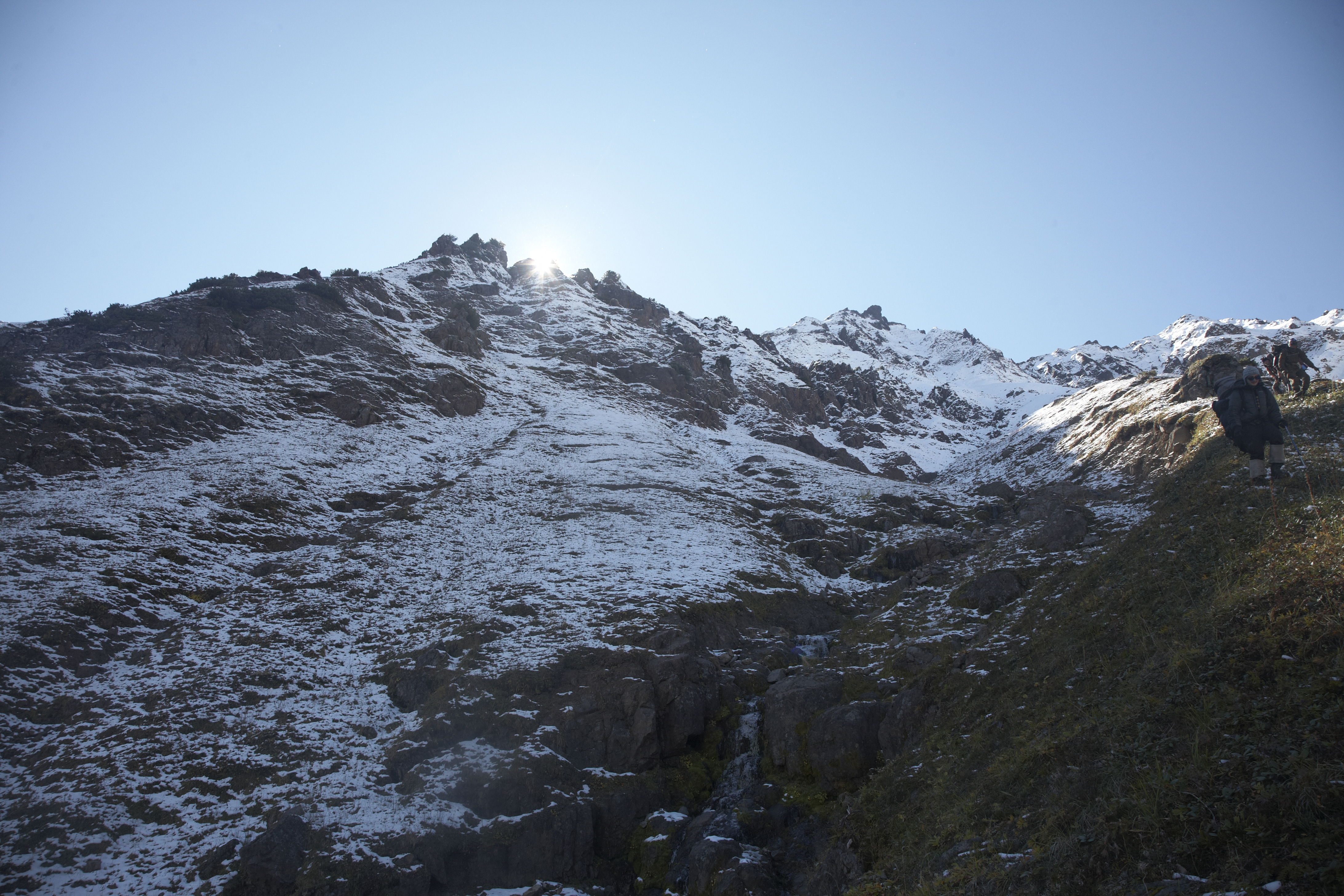 Тимоновский заказник: В истоках реки Авача, Елизовский район, Камчатский край This image is related to the protected area of Russia number 4110062